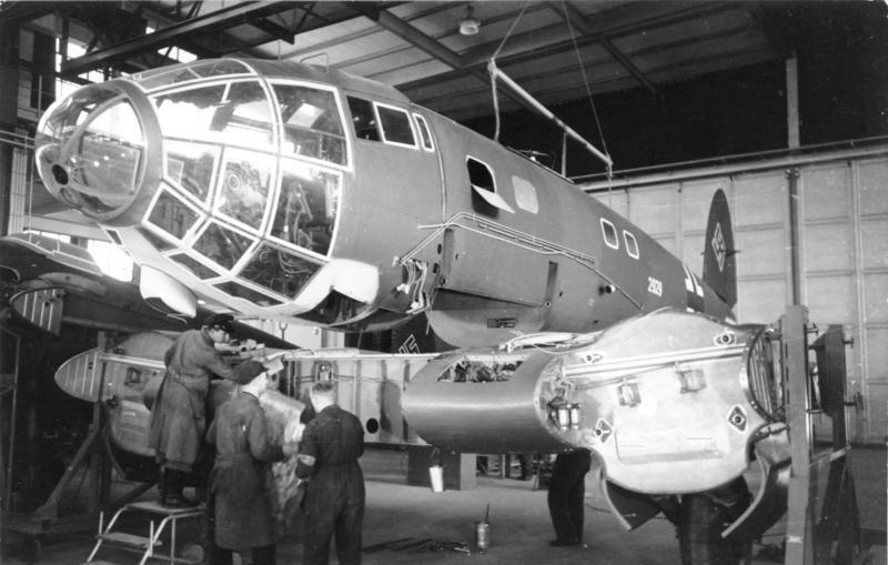 Information added by Wikimedia users.Bau des Bombers Heinkel He 111 P-4 (Werksnummer 2929). Die He 111 P-4 wurde 1939/40 ausgeliefert und hatten die Werksnummern 2906 - 3129, Datum der Aufnahme daher wohl 1939.